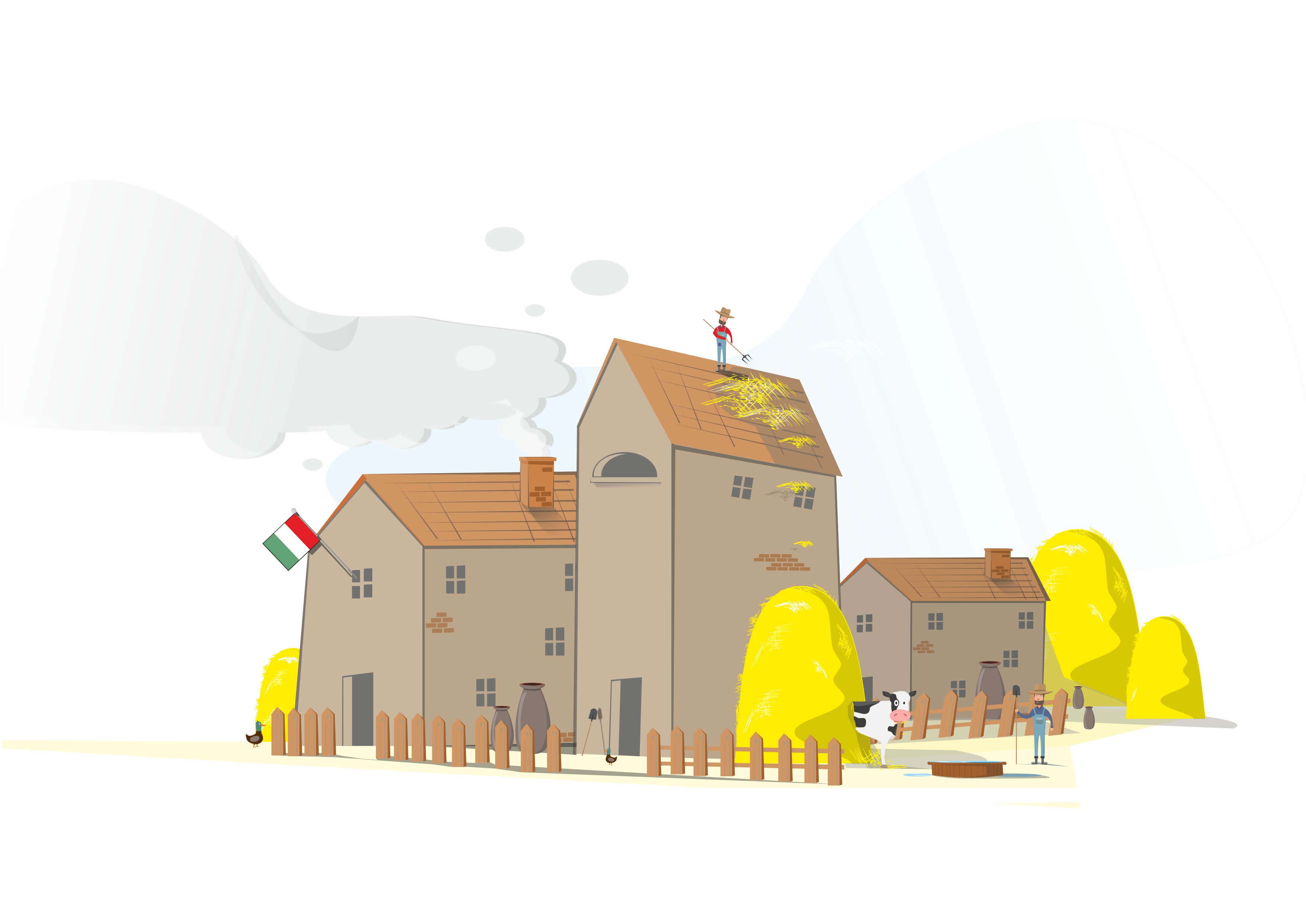 Сан-Сперато до 1960 года (иллюстрация)